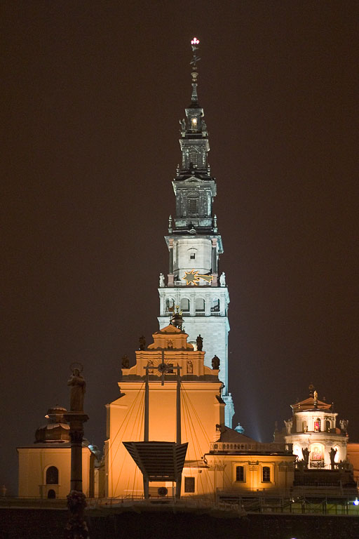 Jasna Góra monastery by night Photo made on 2005-02-04 by Adam Kumiszcza.